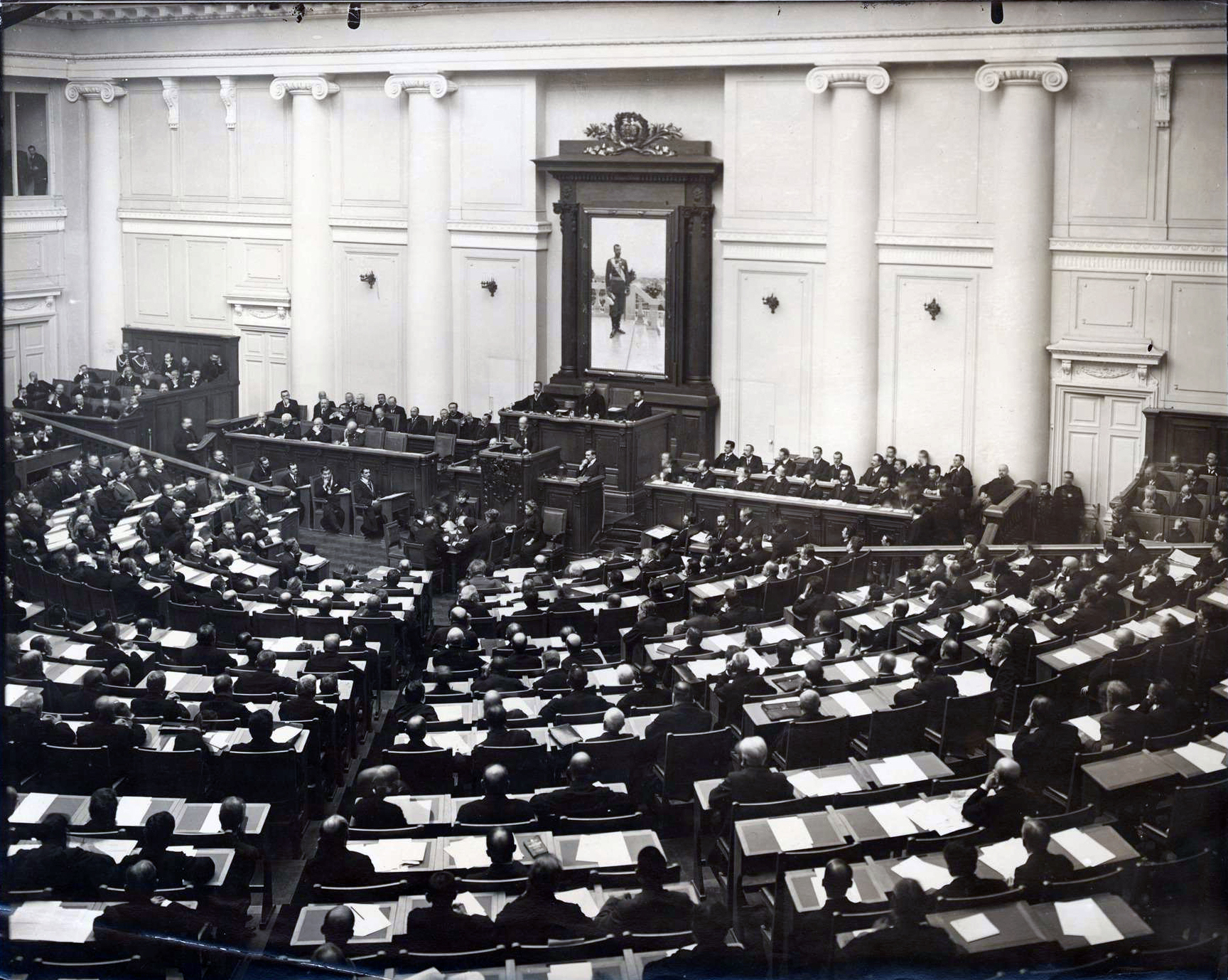 Заседание 4-й Государственной Думы 5 декабря 1912 года. Председатель Совета министров граф В.Н. Коковцов читает декларацию правительства.